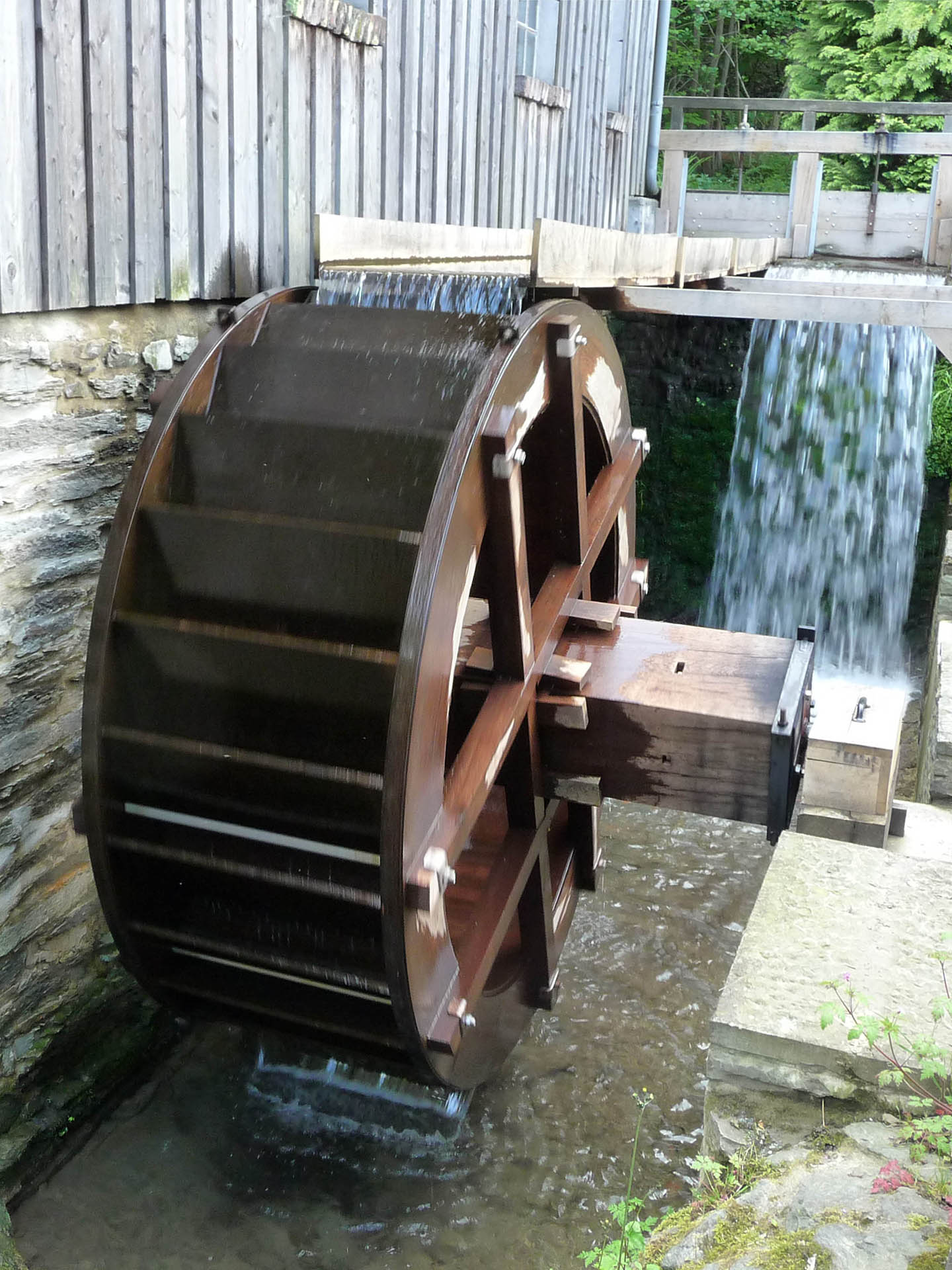 Oberschlächtiges Wasserrad der Alten Kornmühle Ramsbeck